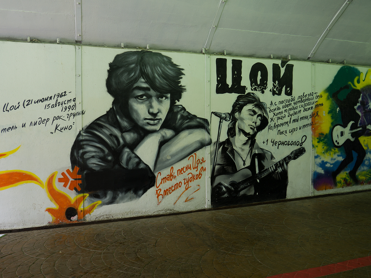 Екатеринбург: пр.Ленина: подземный переход; 17.05.2015